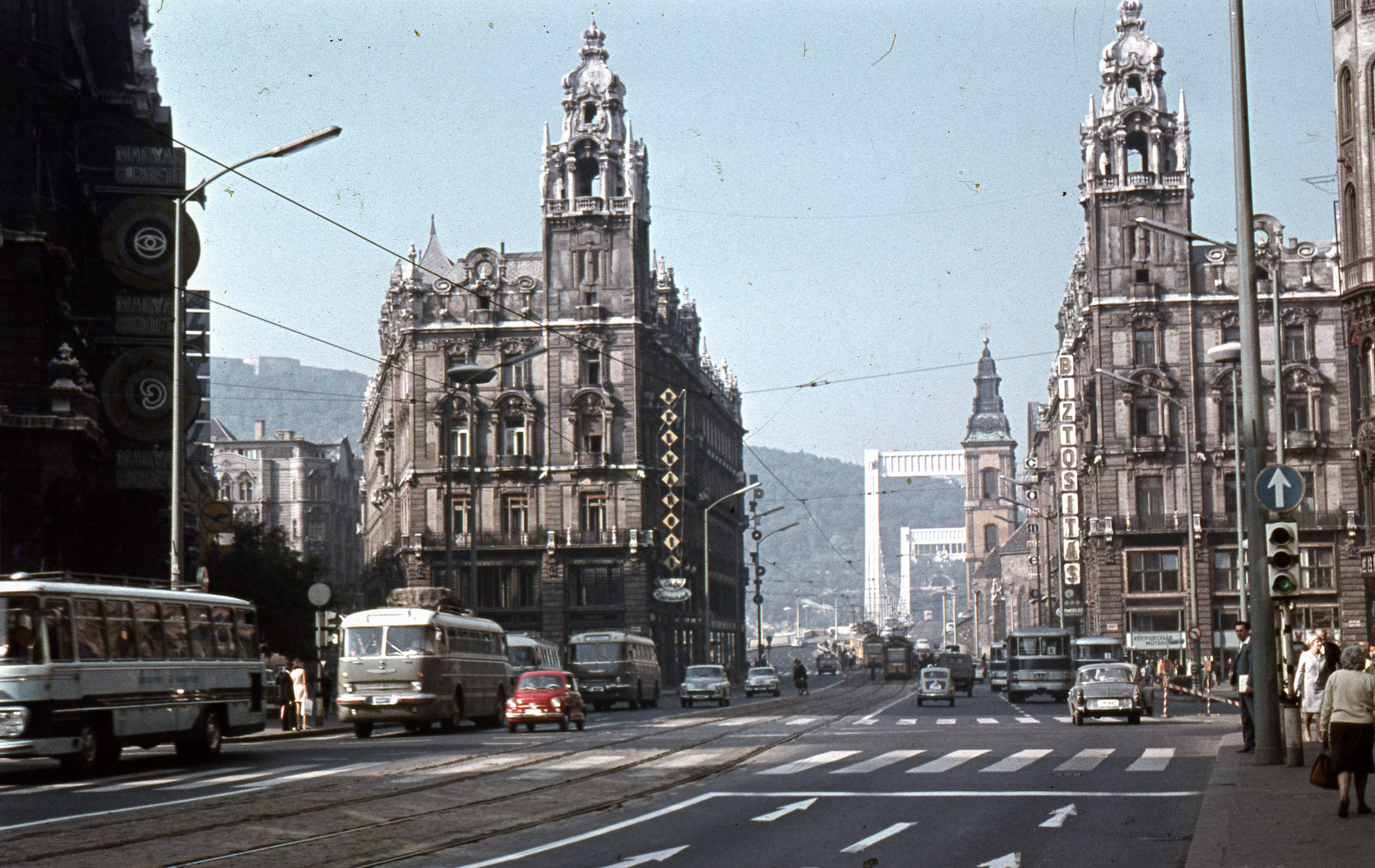 Ferenciek tere (Felszabadulás tér) a Szabad sajtó út felé nézve. Háttérben az Erzsébet híd. Location: Hungary, Budapest V. Tags: Budapest, neon sign Title: Ferenciek tere (Felszabadulás tér) a Szabad sajtó út felé nézve. Háttérben az Erzsébet híd.